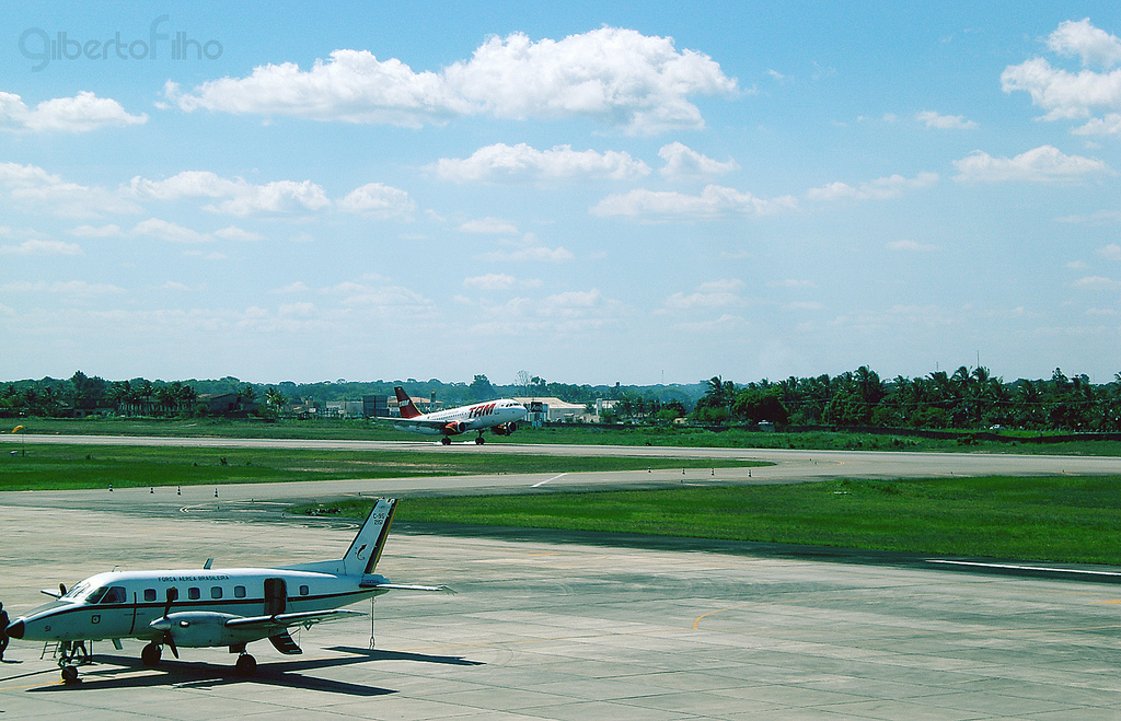 Pouso de um avisão da TAM no Aeroporto de Porto Seguro, Porto Seguro, Bahia, Brasil.